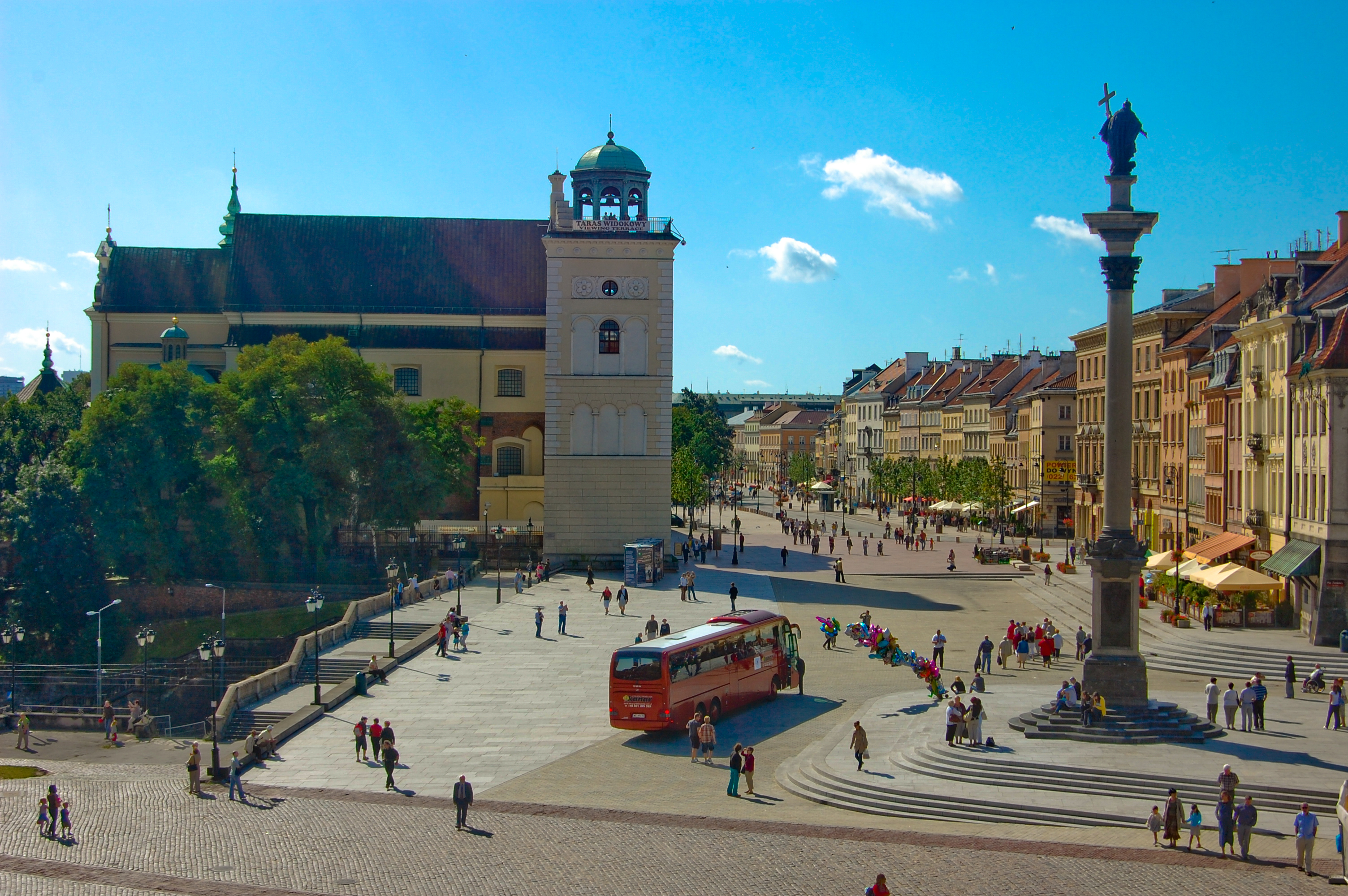 Warszawa - kościół św. Anny i kolumna Zygmunta III Wazy